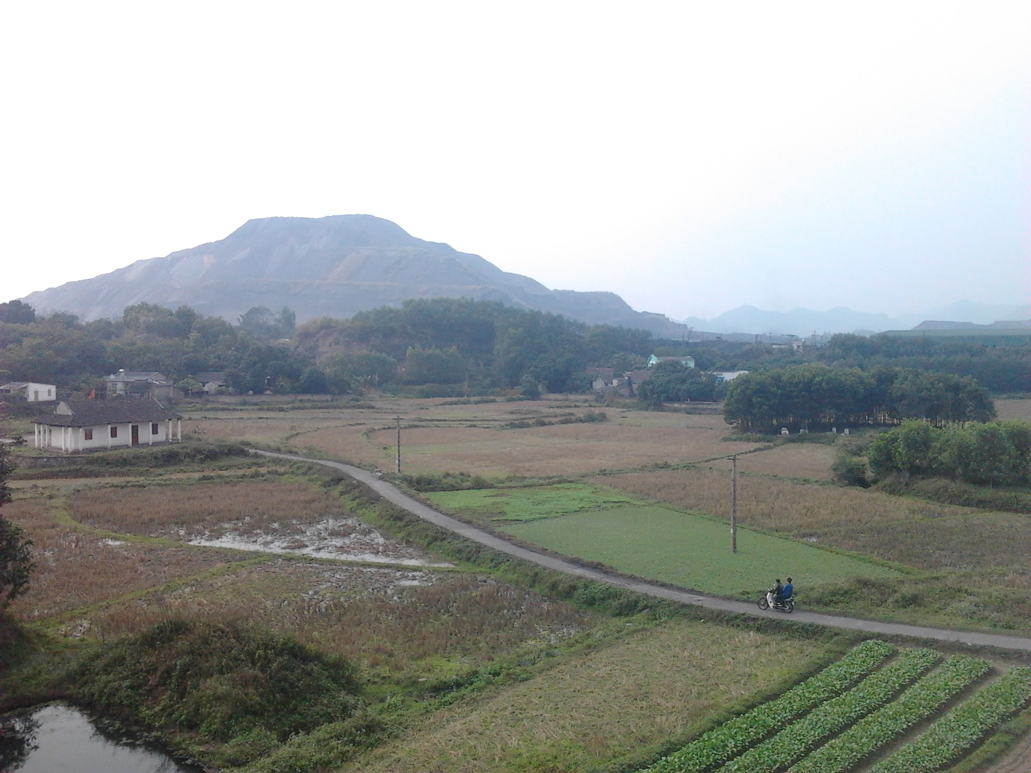 Núi nhân tạo hình thành từ bãi thải của mỏ than Khánh Hòa